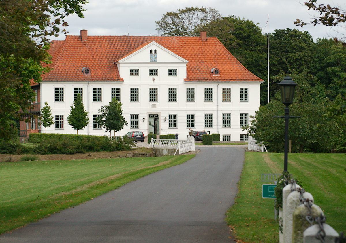 Fraugdegaard i 2012